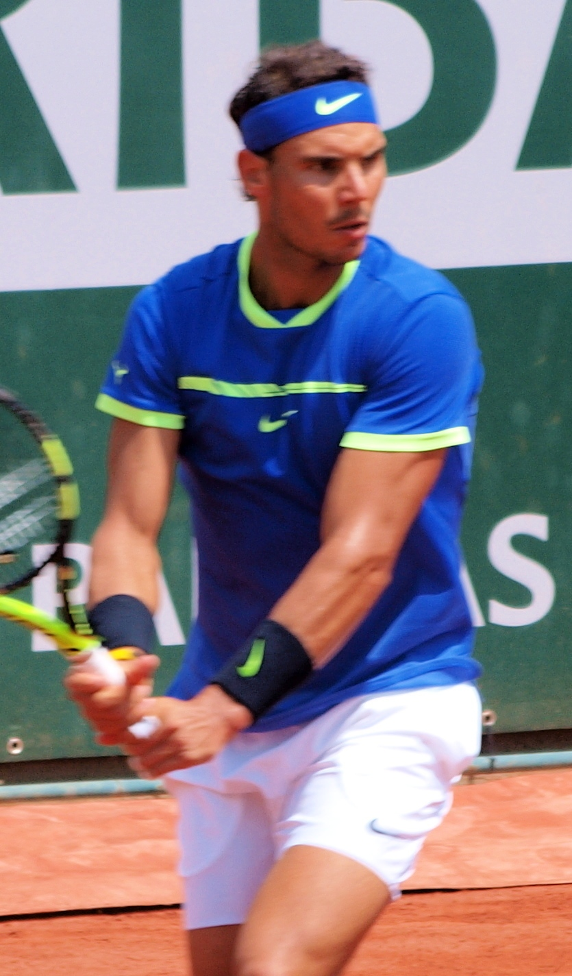 Rafael Nadal lors des Internationaux de France de Tennis au stade Roland Garros de Paris, le 2 juin 2017, durant le match contre Nikoloz Basilashvili.